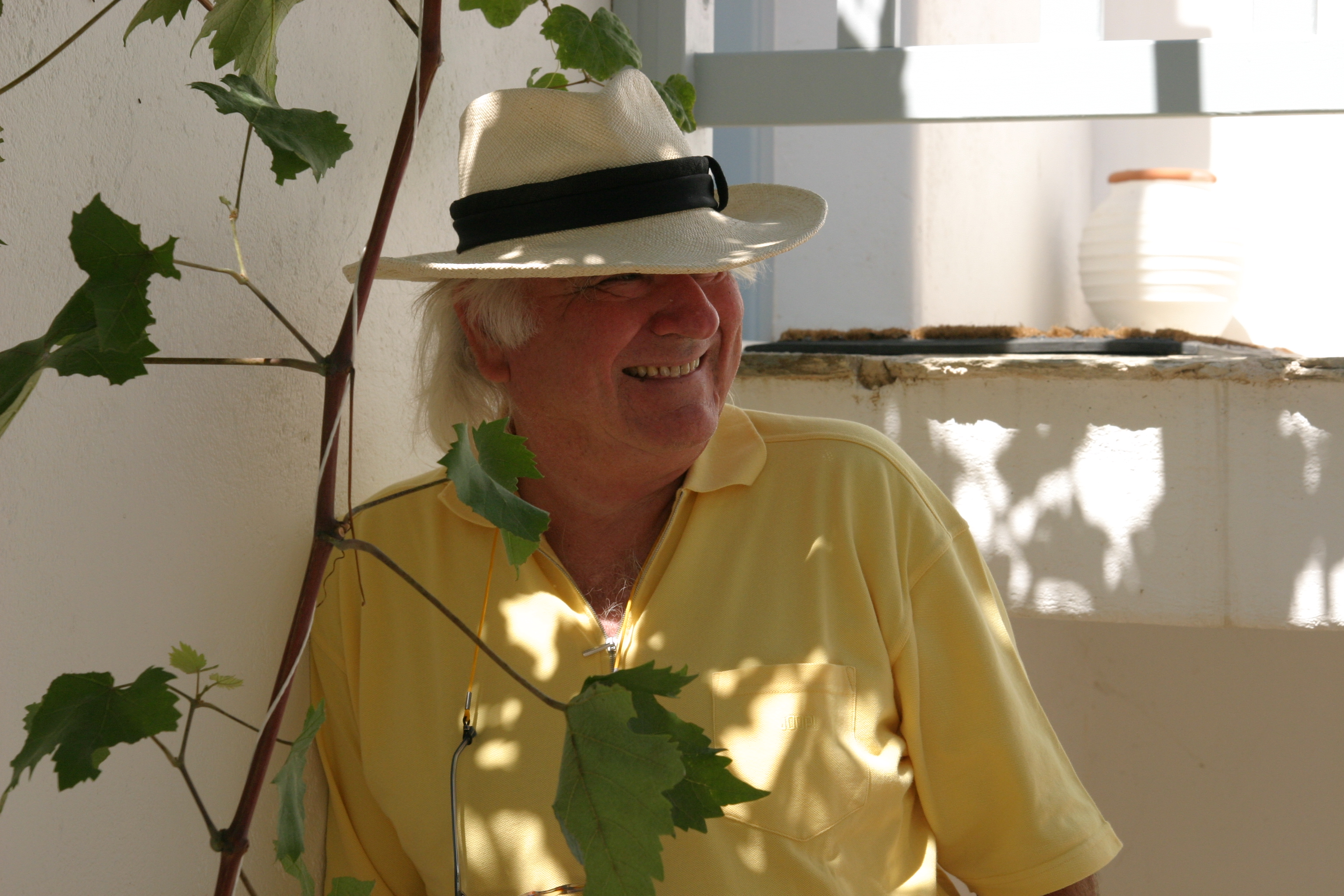 Manfred Rieker Werbefotograf und ADC Mitglied